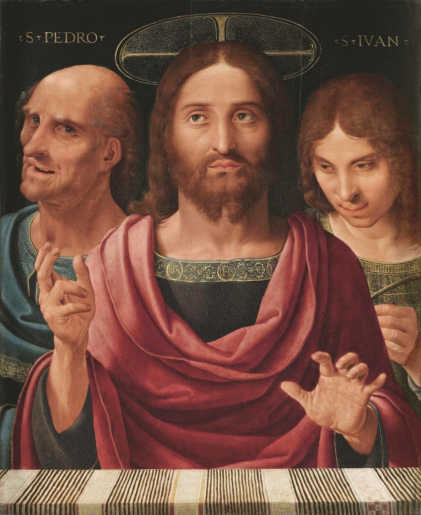 Salvator mundi entre San Pedro y San Juan, óleo sobre tabla, 75 x 62 cm, Madrid, colección Abelló